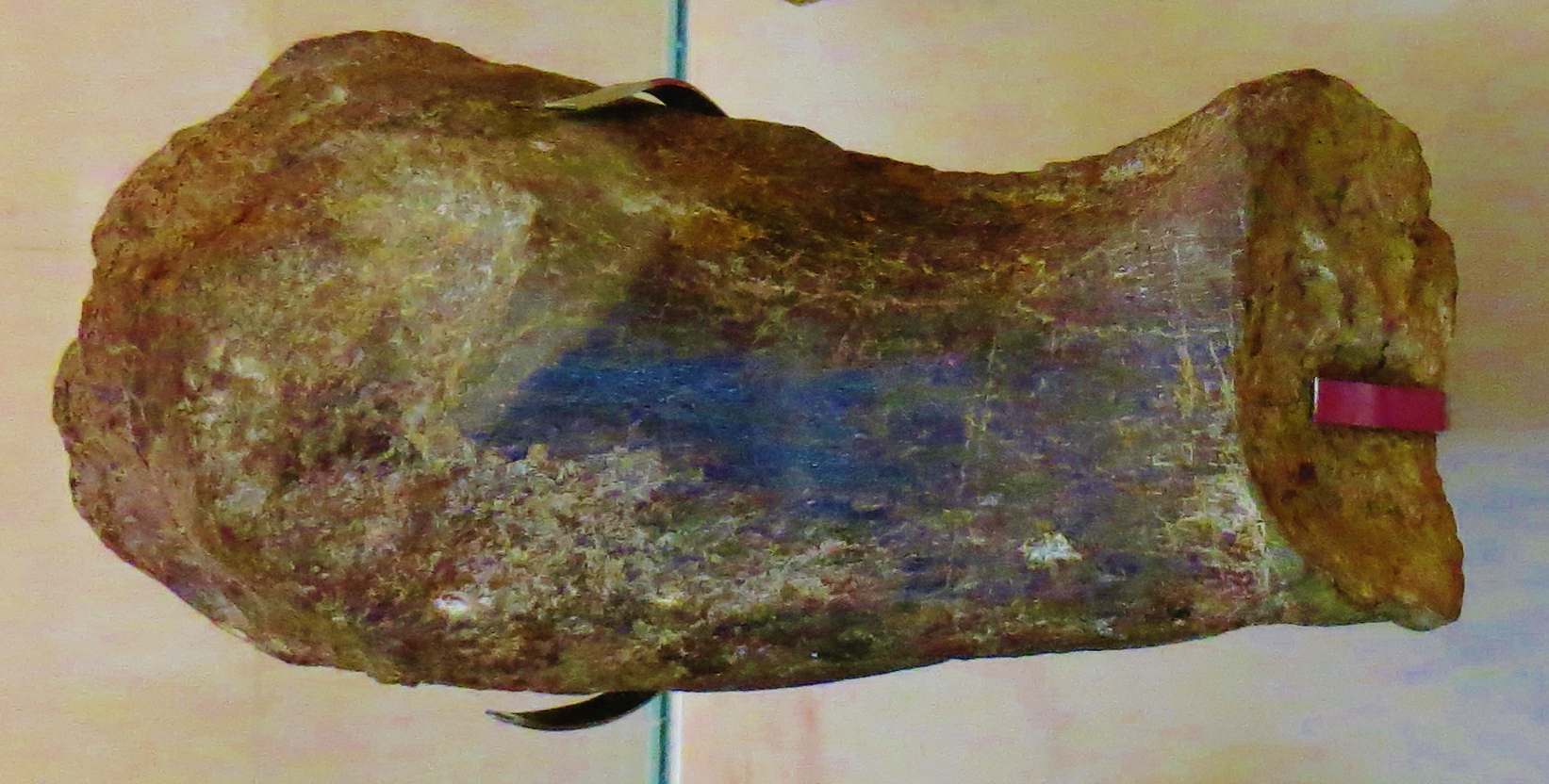 Fossil of Pistosaurus, an extinct reptile- Took the picture at Muse (Trento)